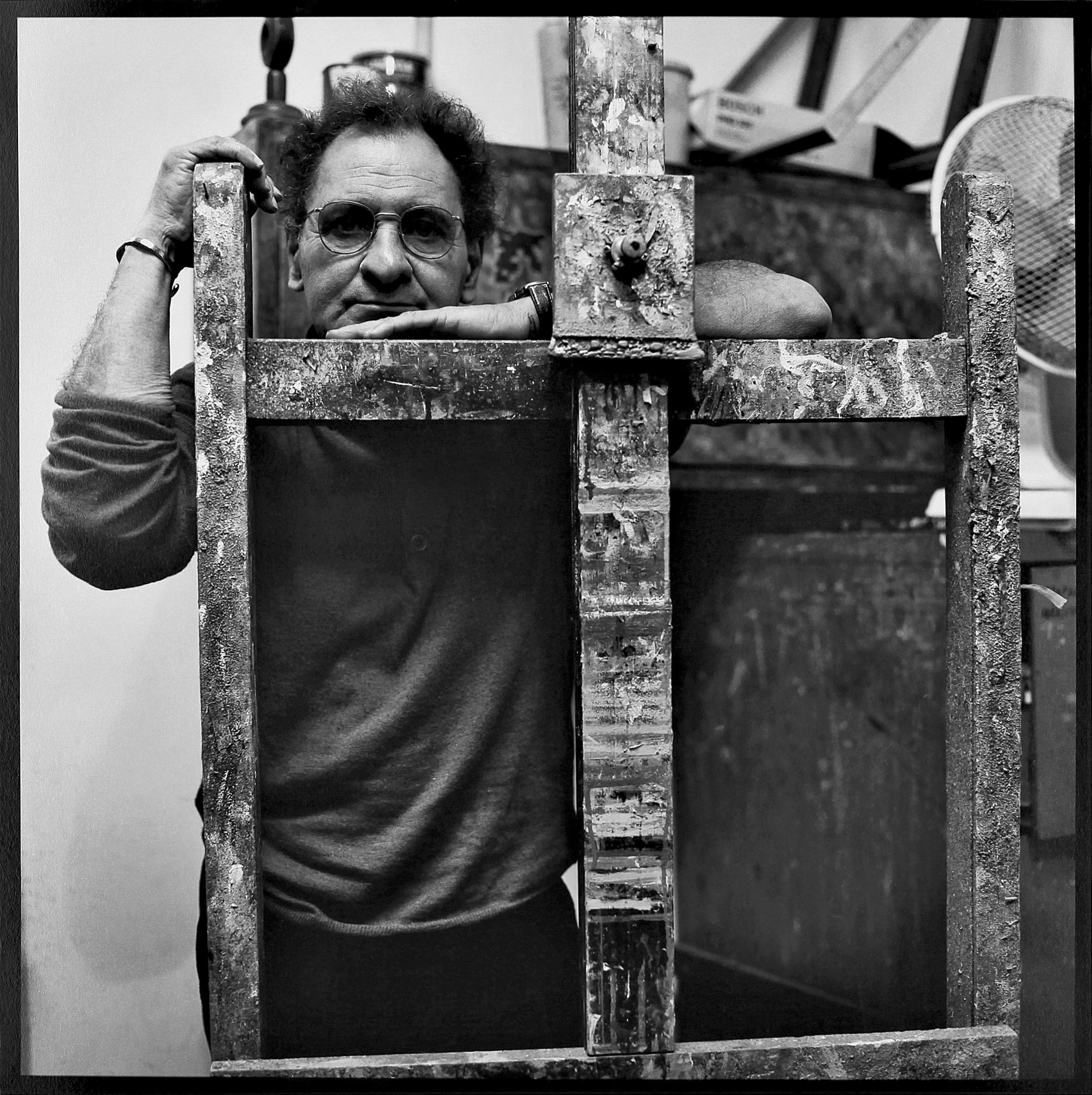 Fotografia del Pittore Giuseppe Martinelli nel suo studio di Milano